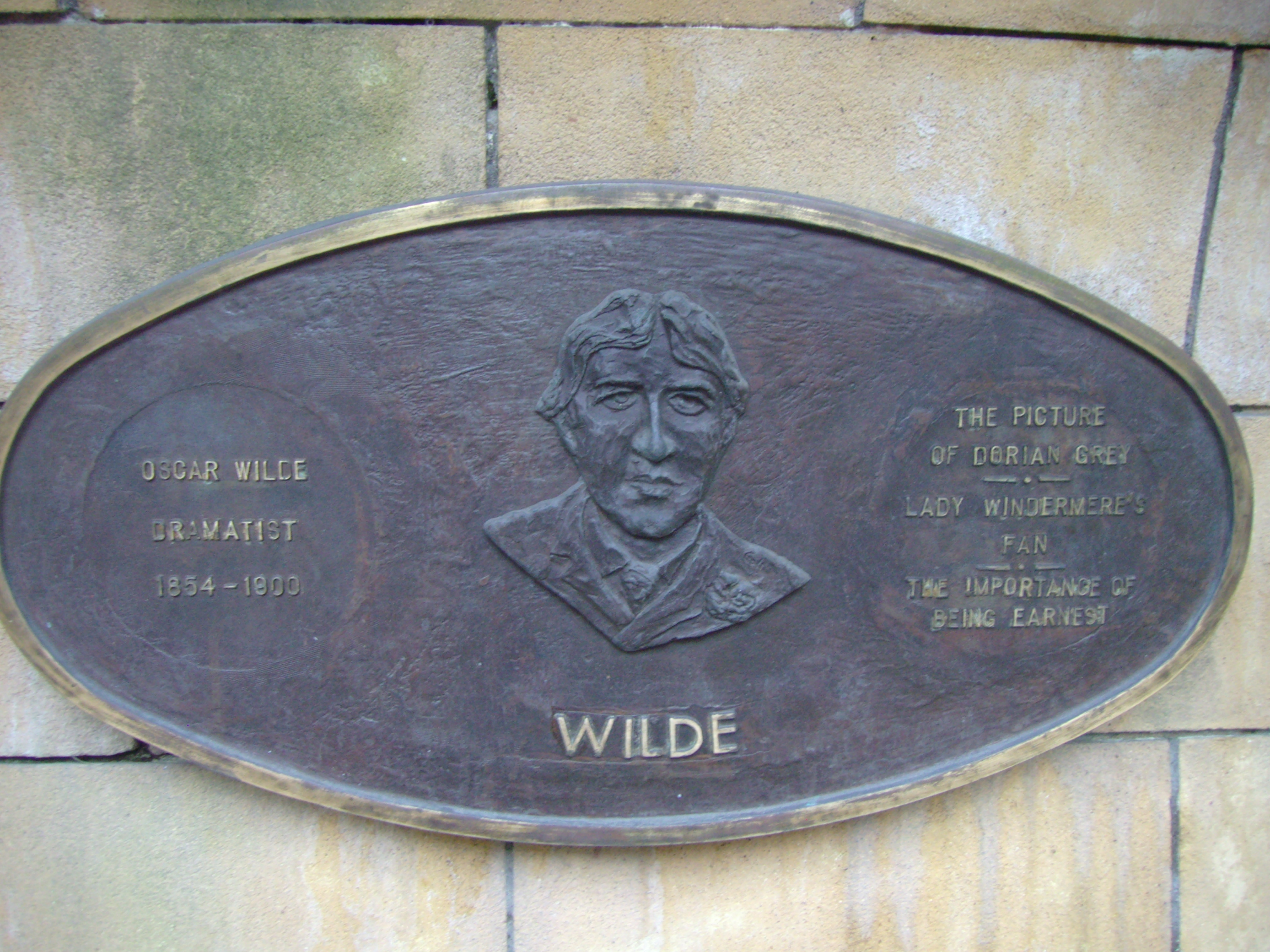 Oscar Wilde (1854–1900), irischer Dichter; Plakette im Saint Patrick's Park, Dublin, dort angebracht anlässlich der Dublin Millennium 988–1988 Literary Parade